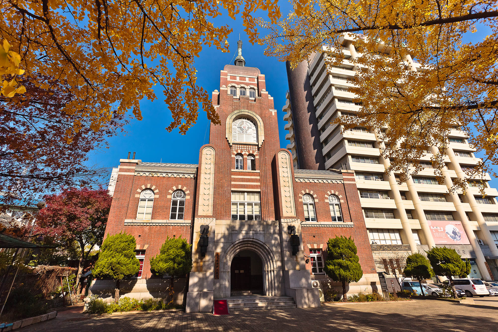 천도교 중앙대교당